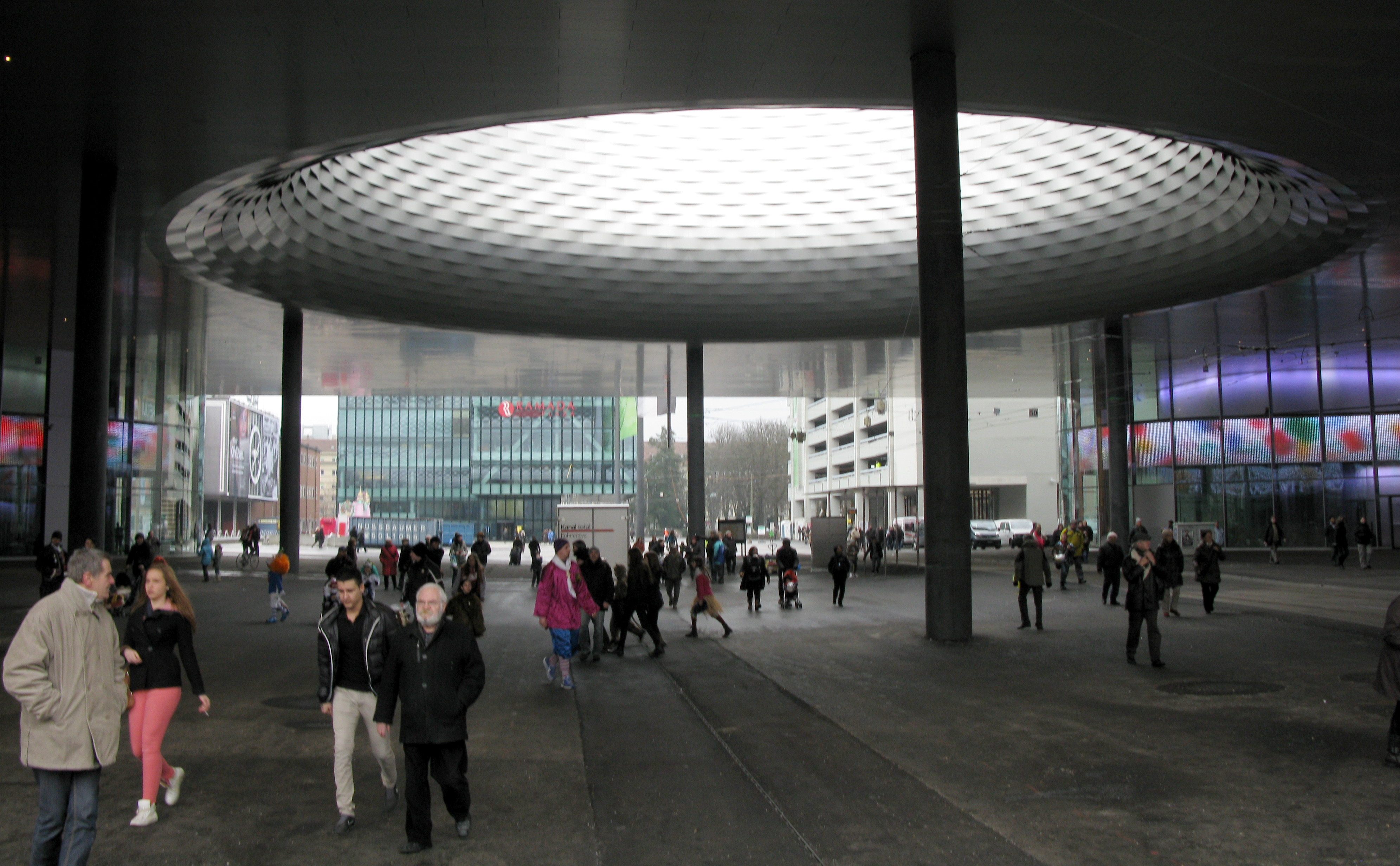 Loch im Herzog & de Meuron Bau in Basel